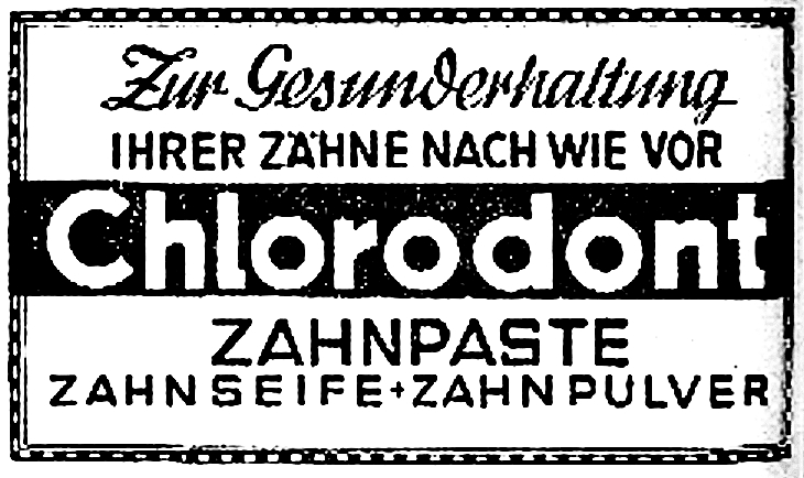 Chlorodont-Werbung aus "Deutschlands Stimme" (Leipzig), 1949, auf Seite "Gewählte Kandidaten zum Deutschen Volksrat "Wahl vom 30. Mai 1949""